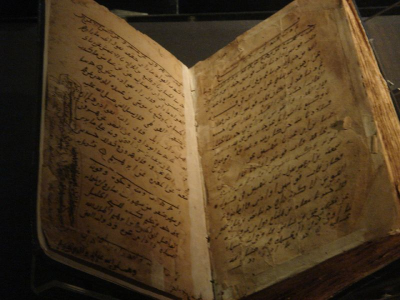 Old Koran manuscript, Alexandria library